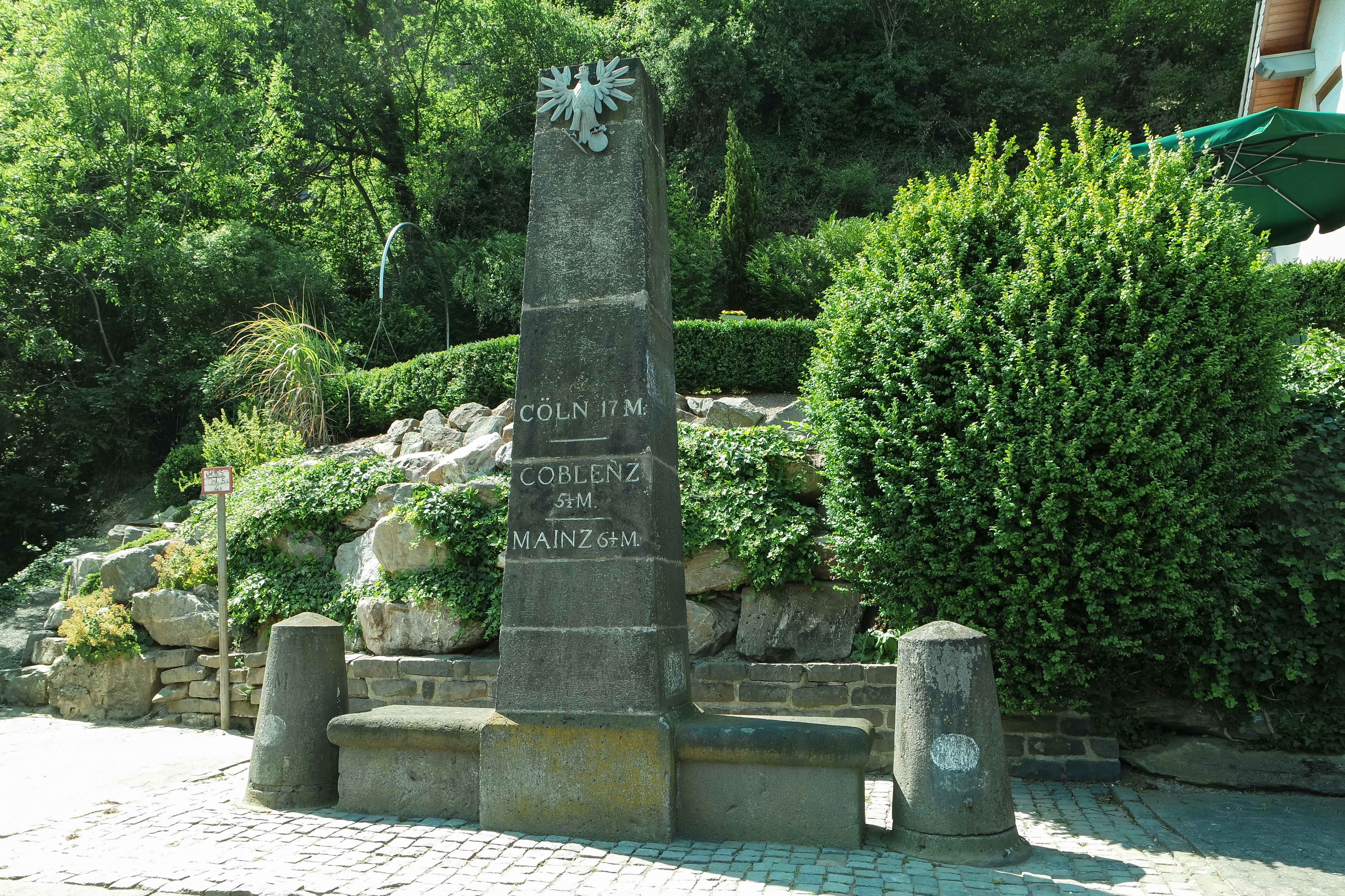 Preußischer Ganzmeilenstein mit Sitzbank in Oberwesel. Neben dem Ganzmeilenstein stehen noch zwei Halbmeilensteine.